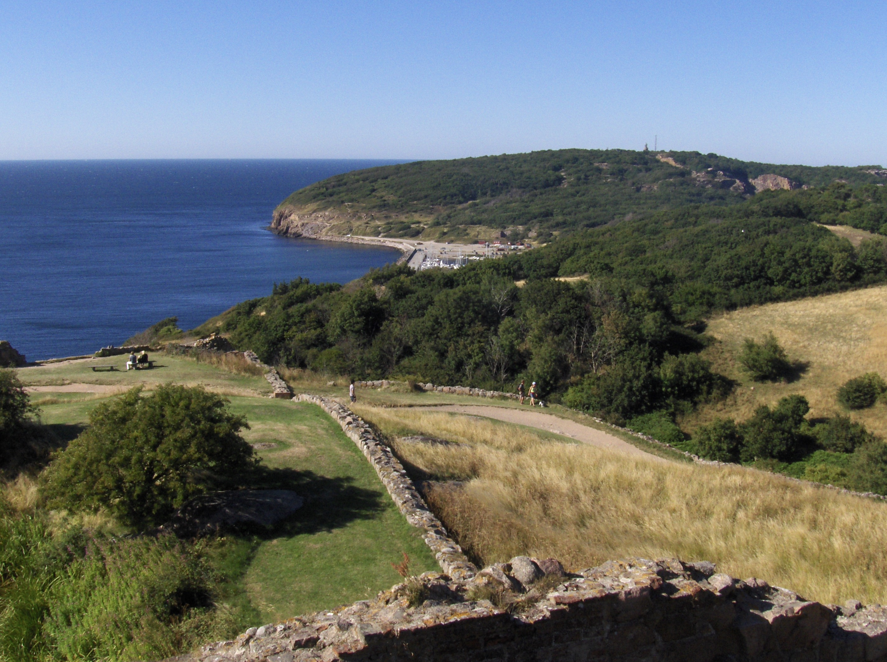 Hammeren seen from Hammershus